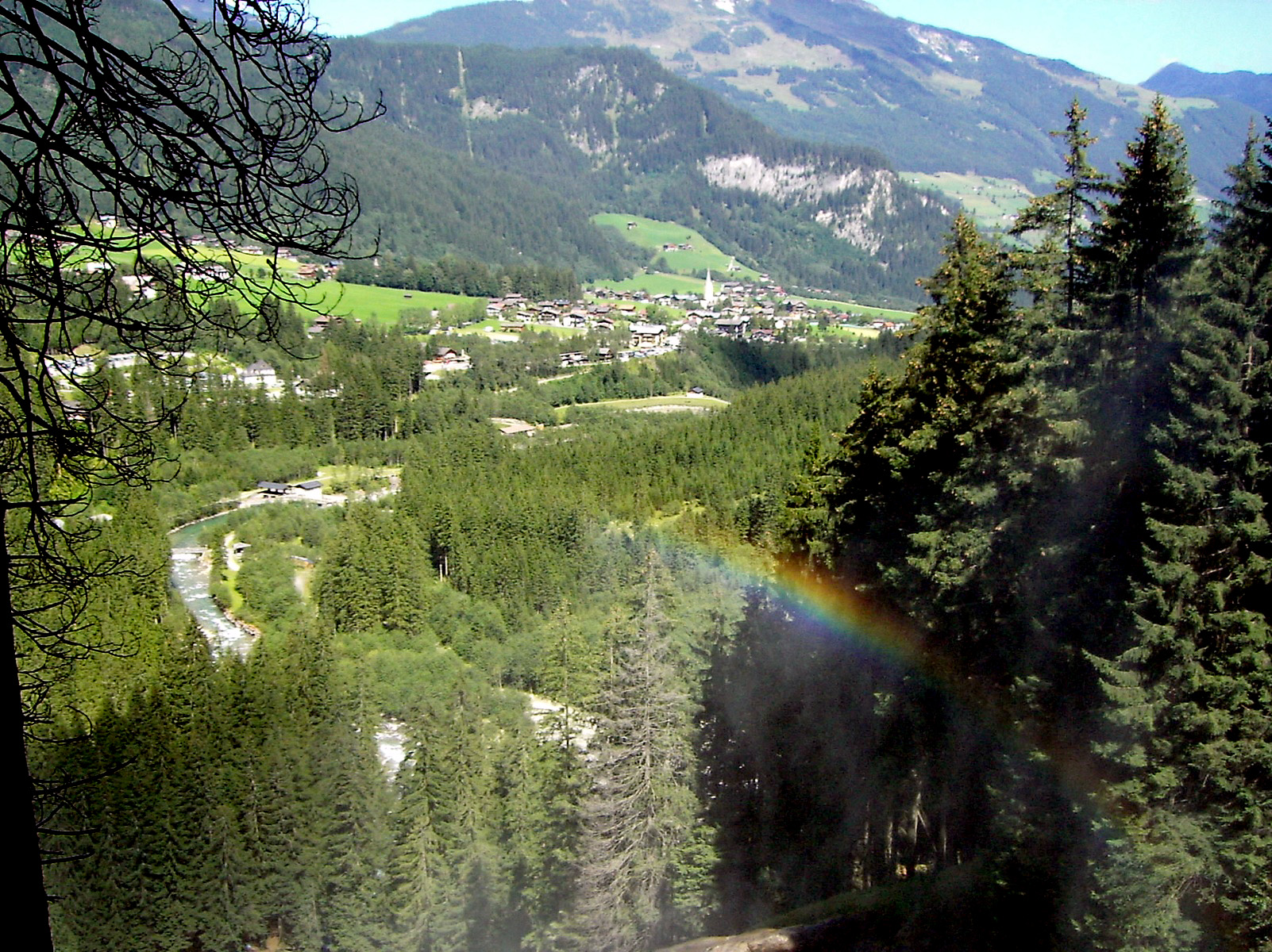 Face View of Krimml from cascades "Krimml Wasserfälle", Salzburger Land - Austria